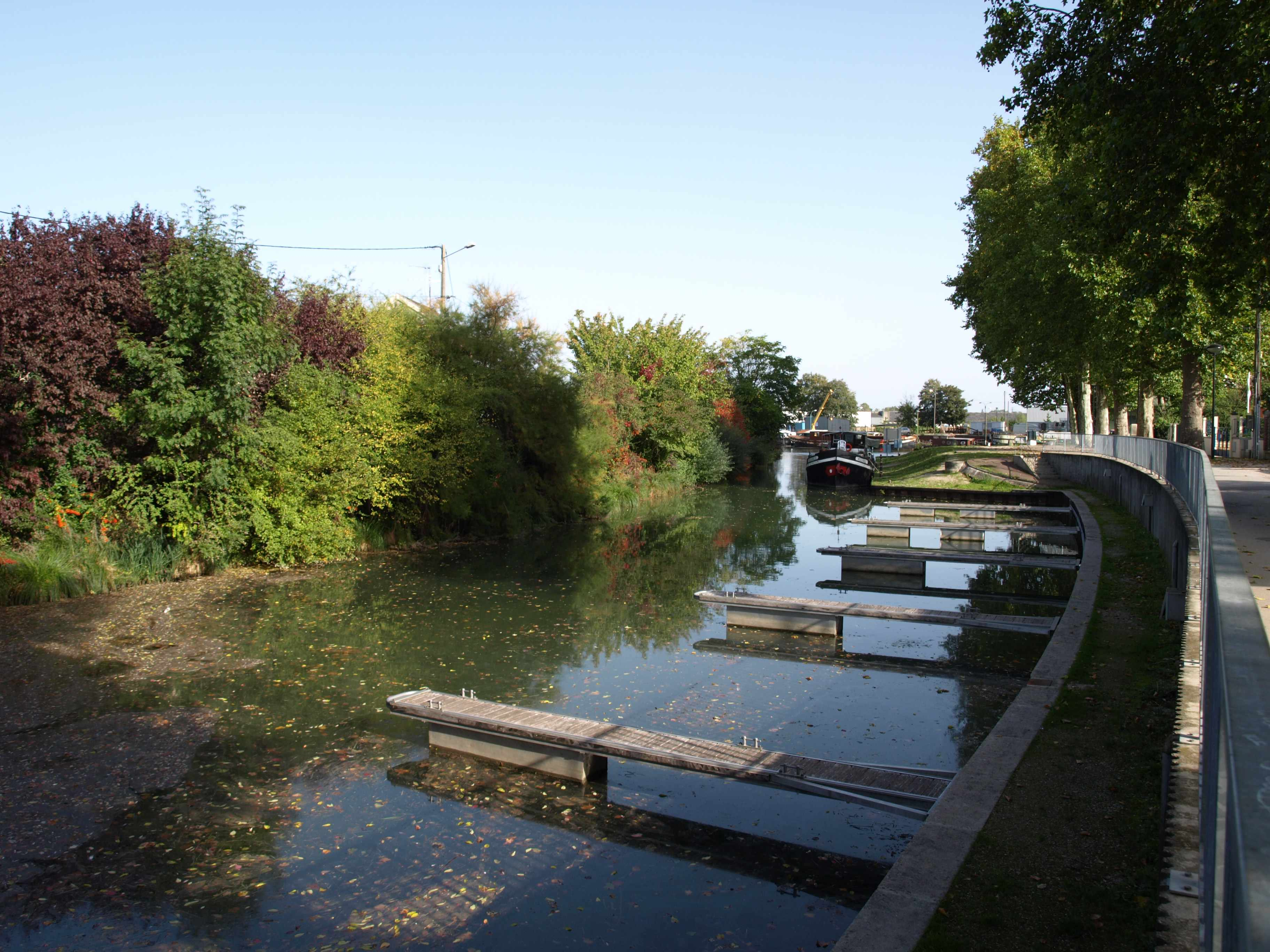 Vitry-le-François (51300 - FRANCE) : photographies Quai et port de plaisance du Canal de la Marne à la saône.